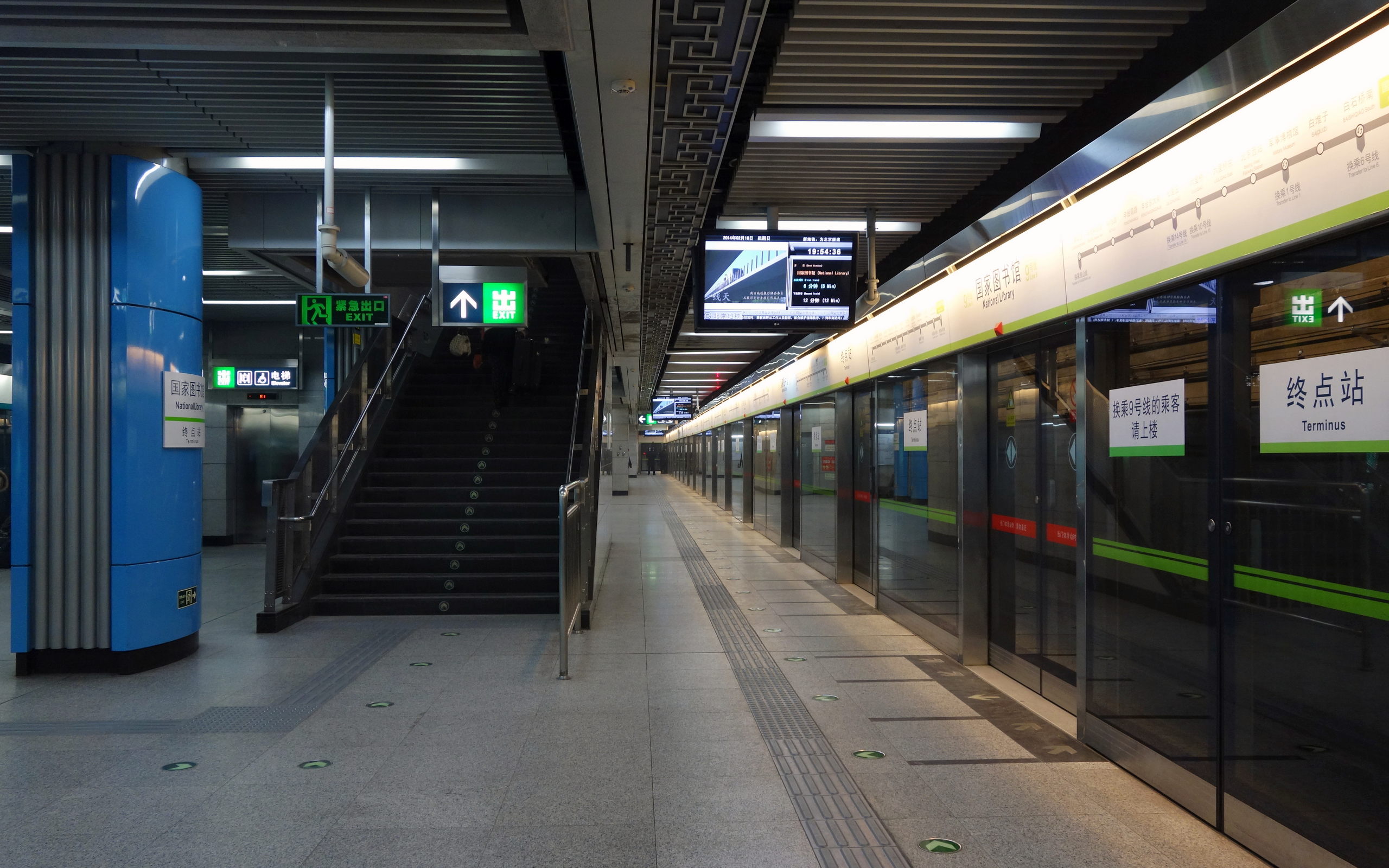 国家图书馆站9号线终点落客月台。